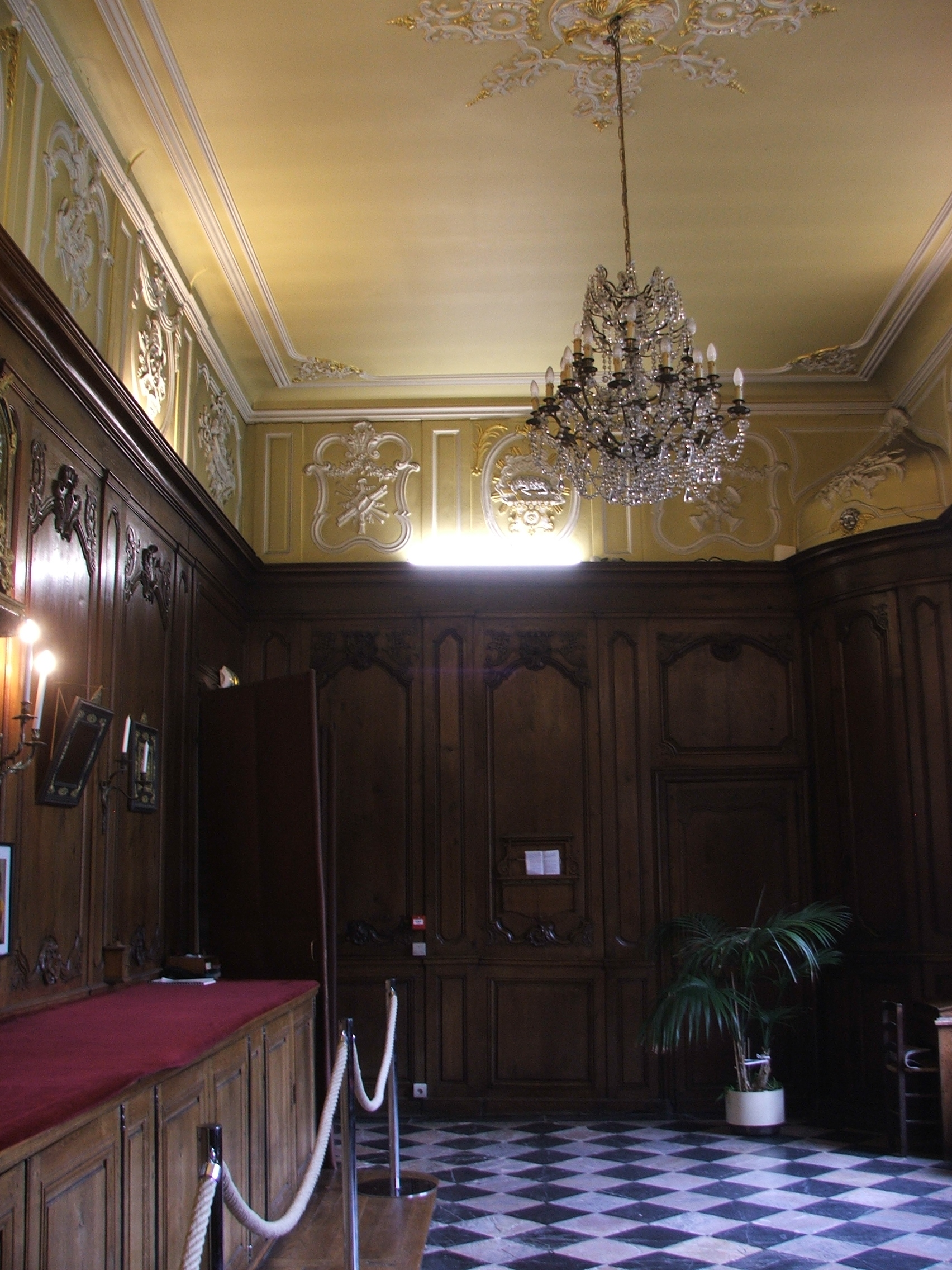 Entrée dans l'actuelle préfecture du Mans depuis l'église notre-dame de la couture.